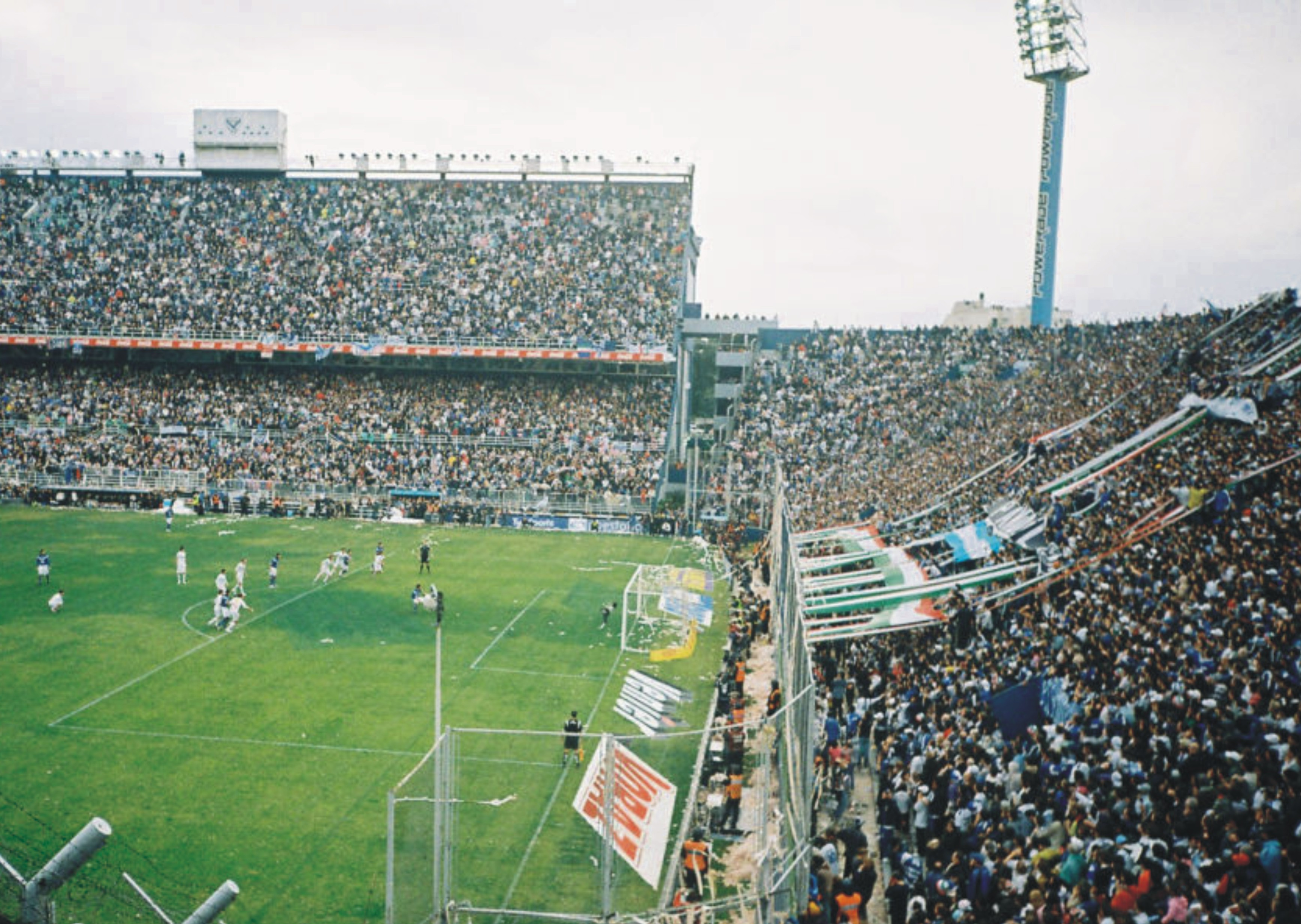 Partido final correspondiente al Torneo Clausura 2009, donde el 5 de julio de 2009 Vélez Sarsfield se consagra Campeón ante el Club Atlético Huracán. Estadio José Amalfitani, Buenos Aires, Argentina